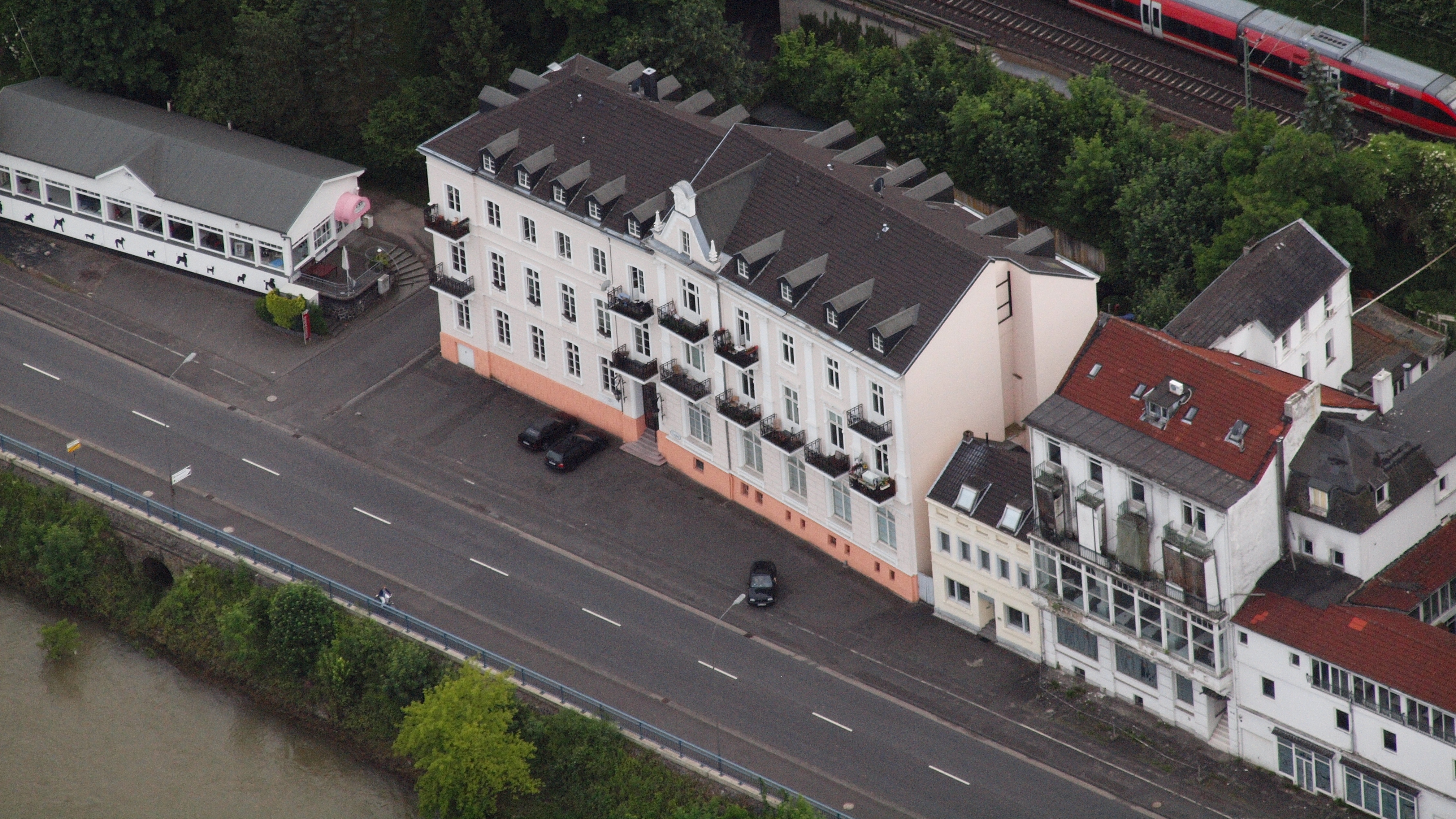 ehemaliges Hotel Rolandseck-Groyen, Mainzer Straße 28/30, Remagen: Luftaufnahme; am oberen Bildrand die linksrheinische Eisenbahnstrecke